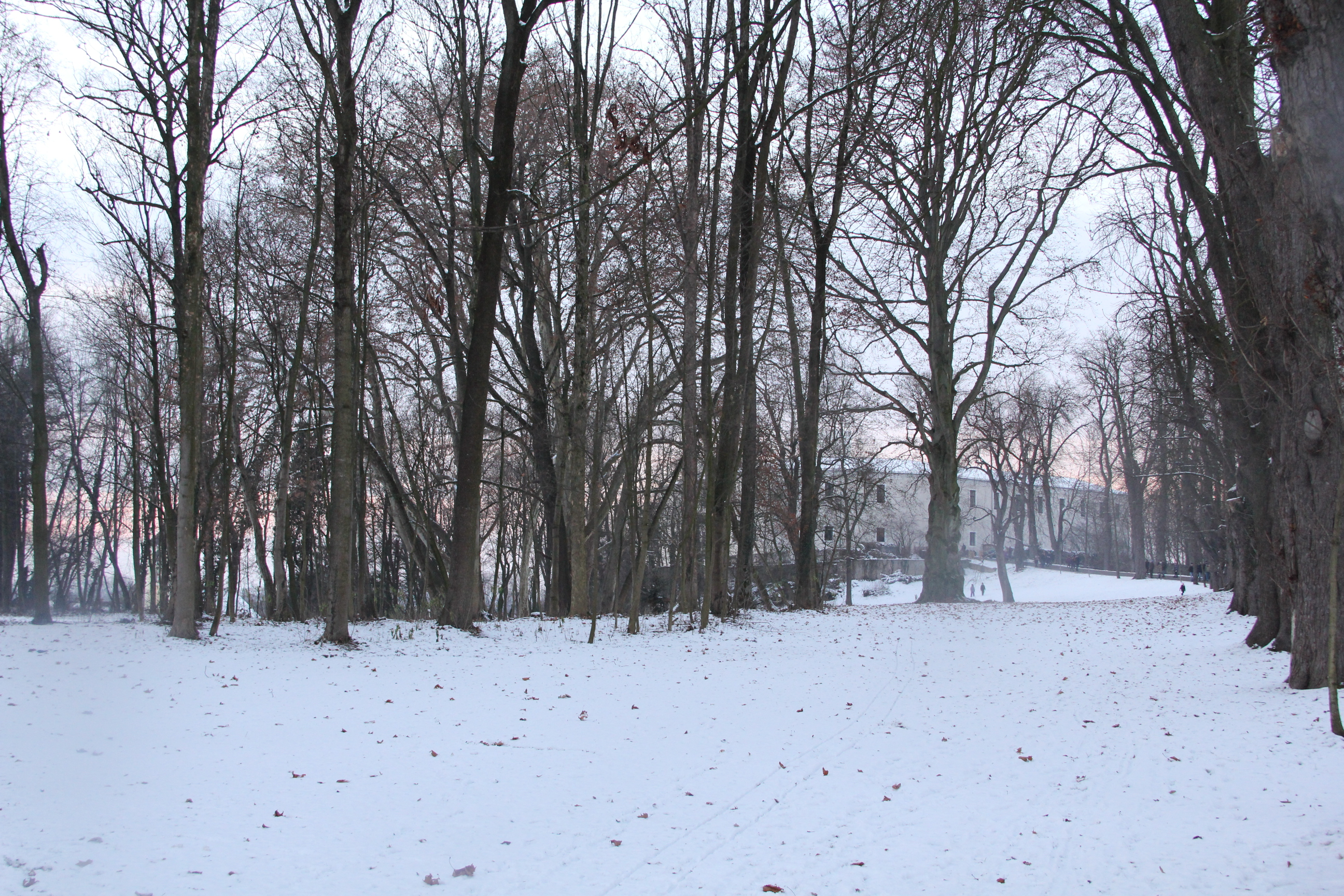 Der Schlosspark im Winter